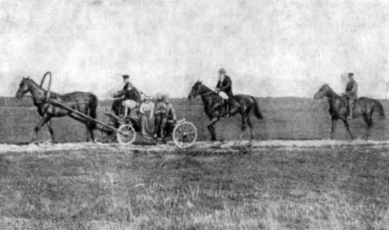 Толстой в окрестностях Крекшина. В экипаже: внучка Толстого Соня (на козлах, рядом с кучером), А. Л. Толстая, А. М. Хирьяков (в светлом картузе) и В. Г. Чертков. Верхами Толстой и В. В. Чертков